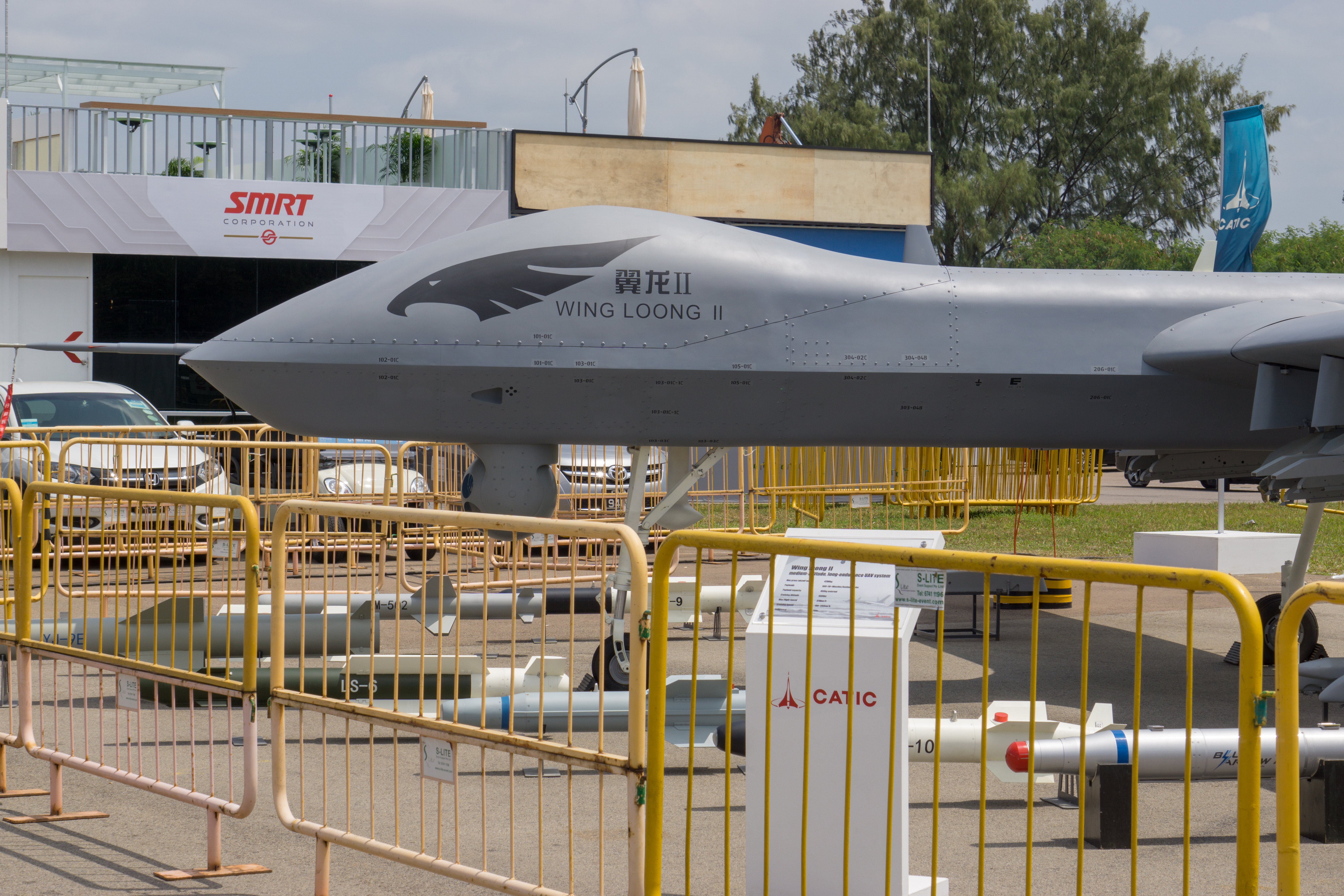 Drone